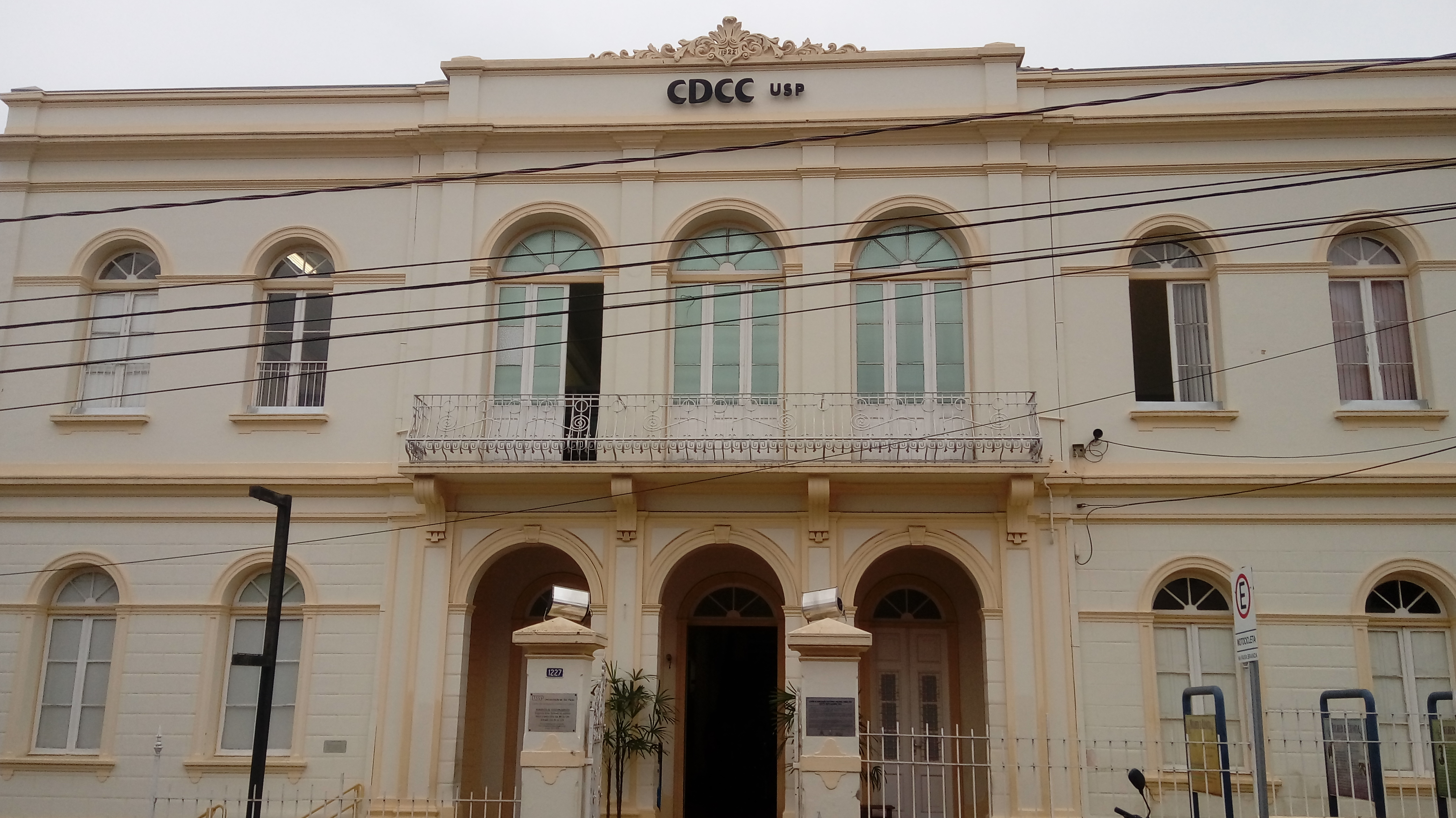 Fachada do Centro de Divulgação Científica e Cultural (CDCC) da USP de São Carlos. Foto: Raniel Andrade.